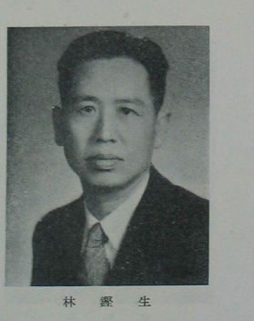 中文（台灣）: 中國人民政治協商會議第一屆全體會議代表